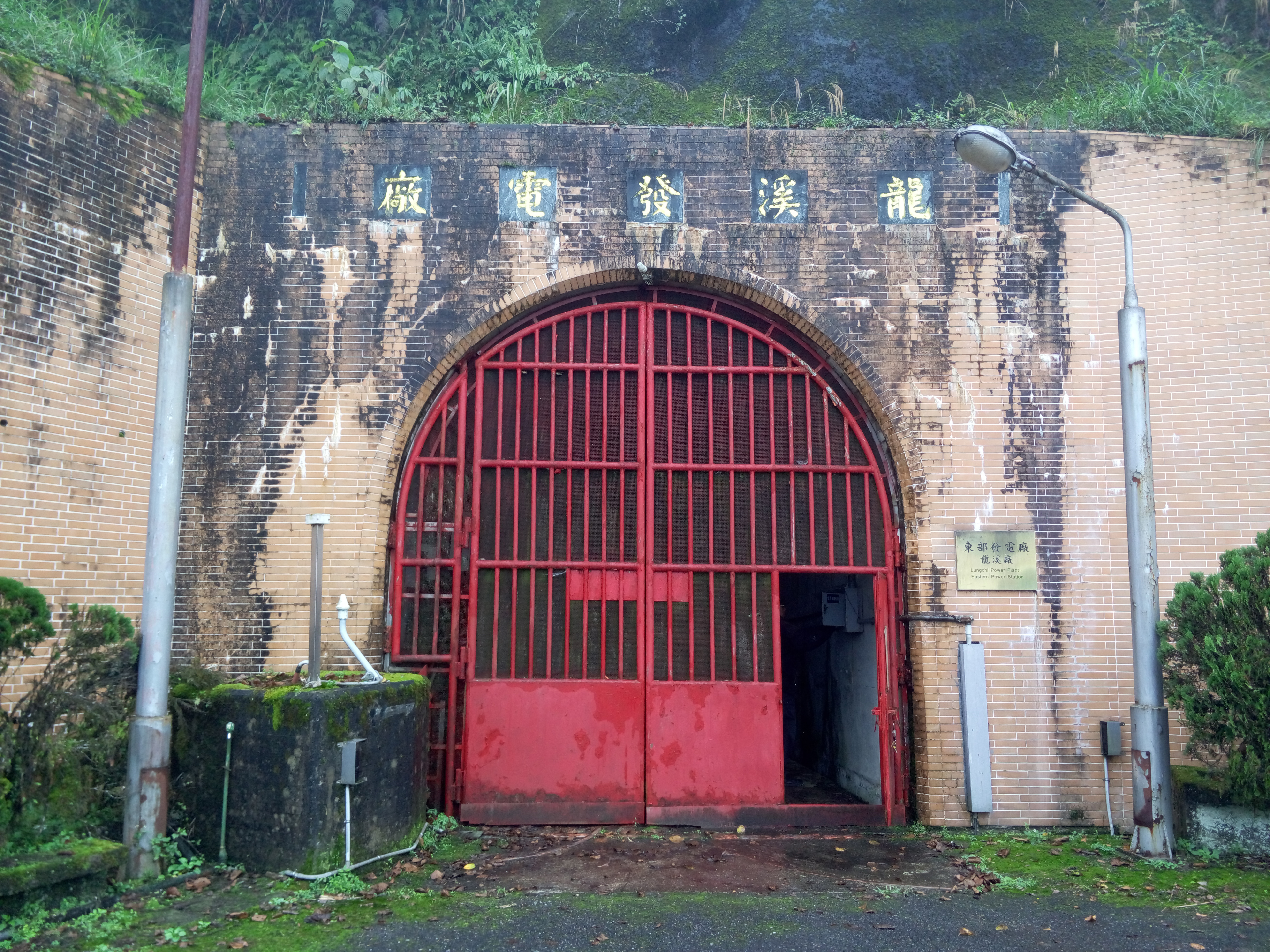 東部發電廠龍溪機組大門